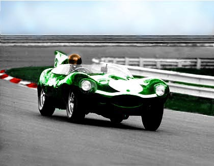 Jaguar D-Type. Version nach 1955, ersichtlich an der "breiten" Windschutzscheibe